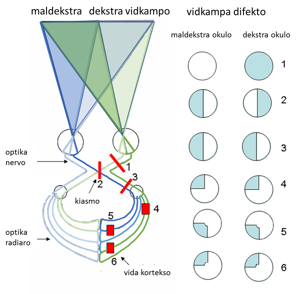 La vida sistemo en la homa cerbo kun la diversaj lokoj por lezoj kaj siaj rilataj vidkampaj difektoj